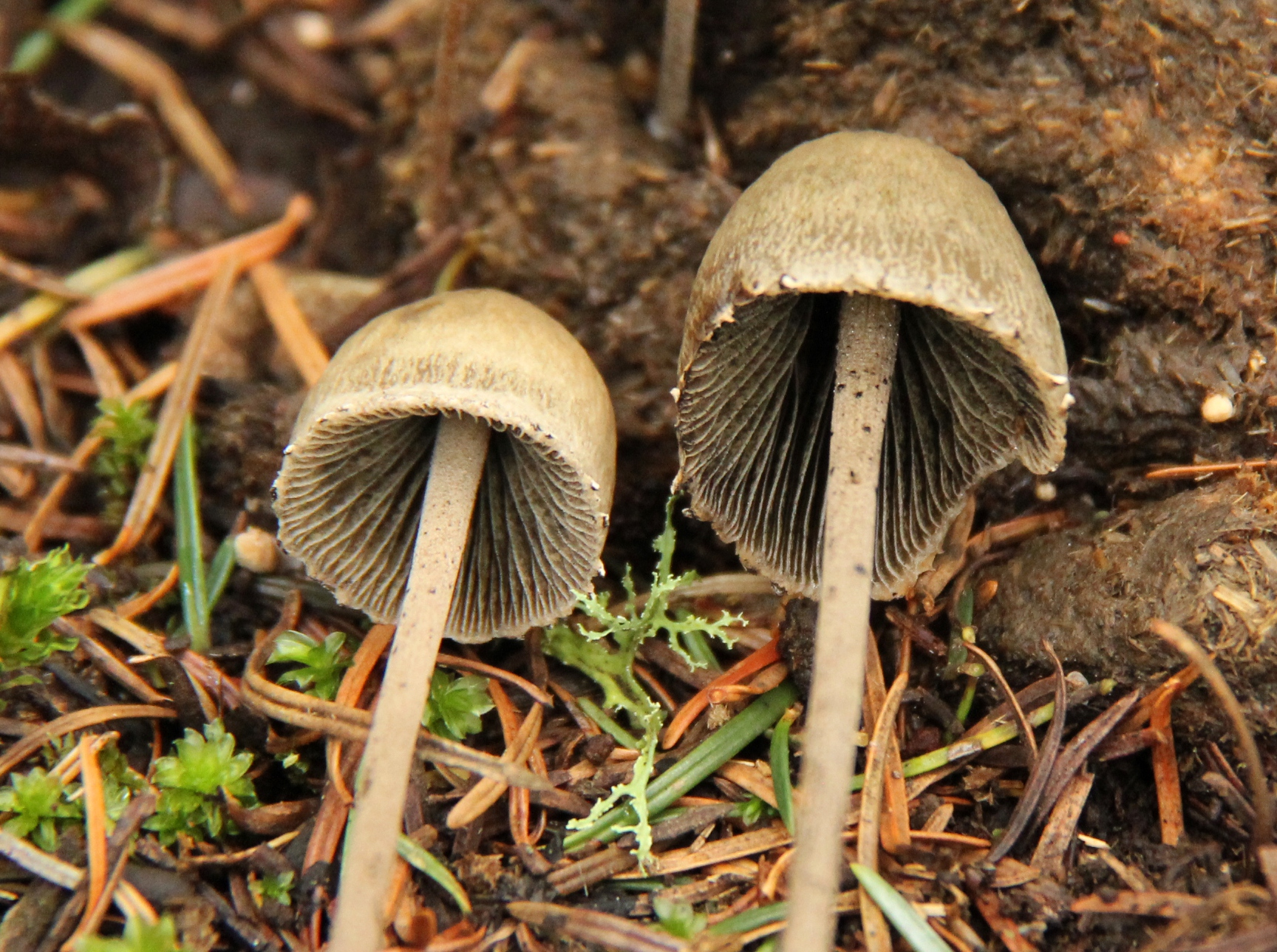 Panaeolus papilionaceus (Bull.) Quél.